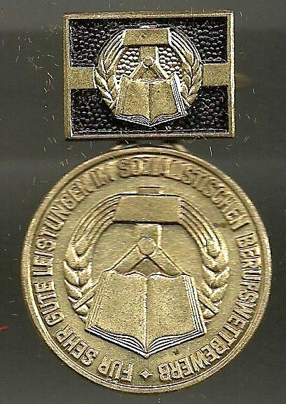 Medaille für sehr gute Leistungen im Berufswettbewerb der DDR